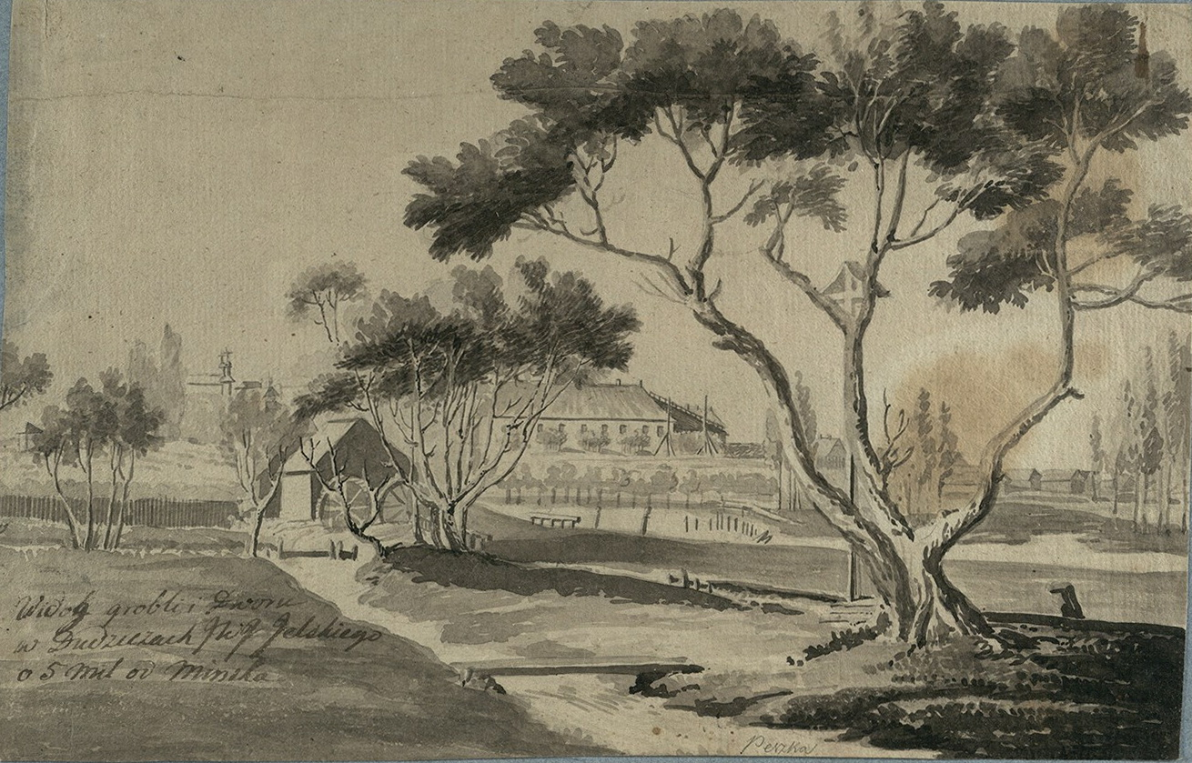 Беларуская (тарашкевіца): Дудзічы (Dudzičy), сядзіба Ельскіх (Jelski)